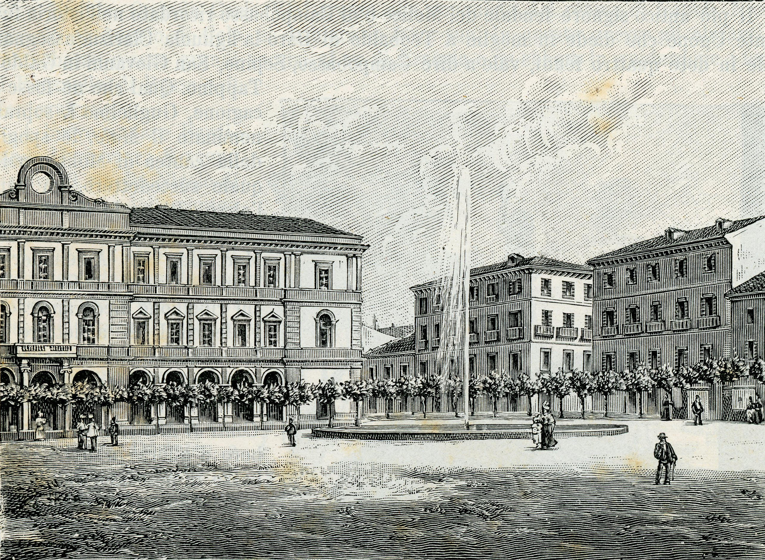 Campobasso: piazza Vittorio Emanuele (incisore anonimo 1898).